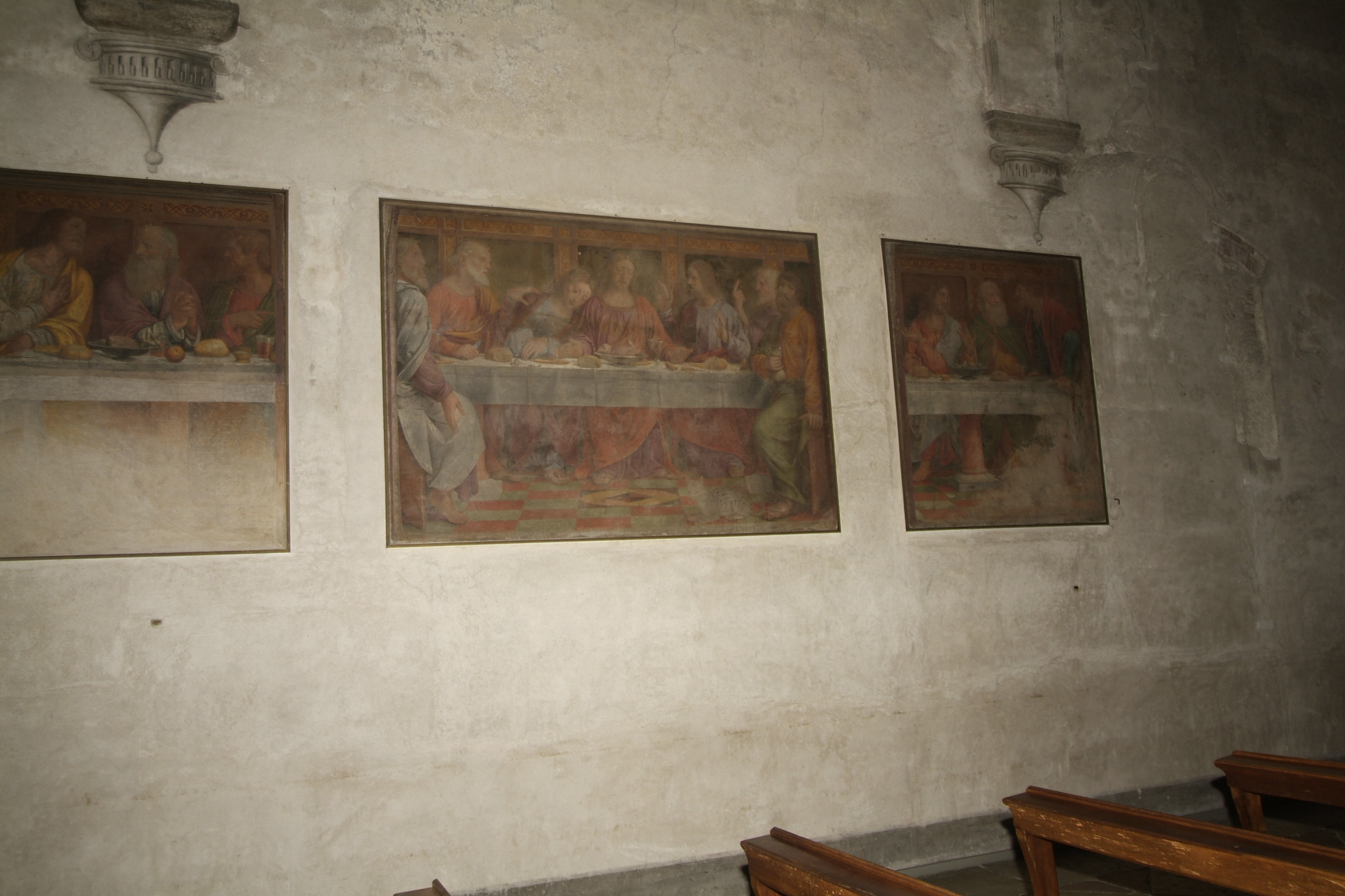 Ultima cena di Bernardo Luini a Santa Maria degli Angioli